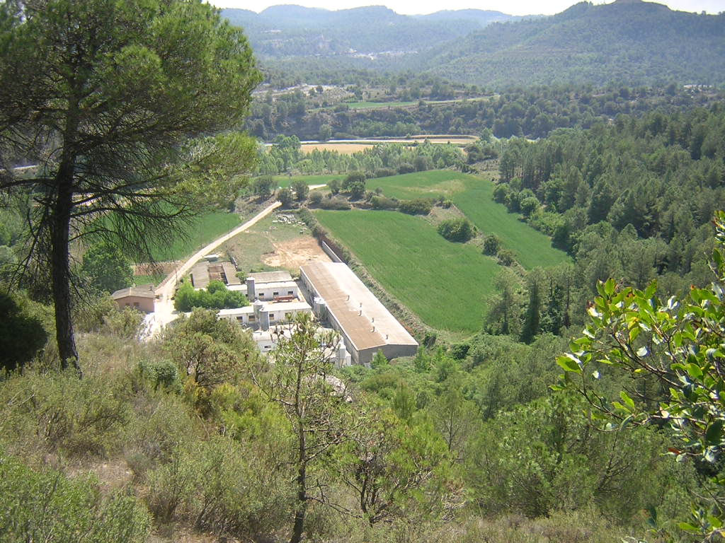 Els Campassos (Monistrol de Calders, Moianès)